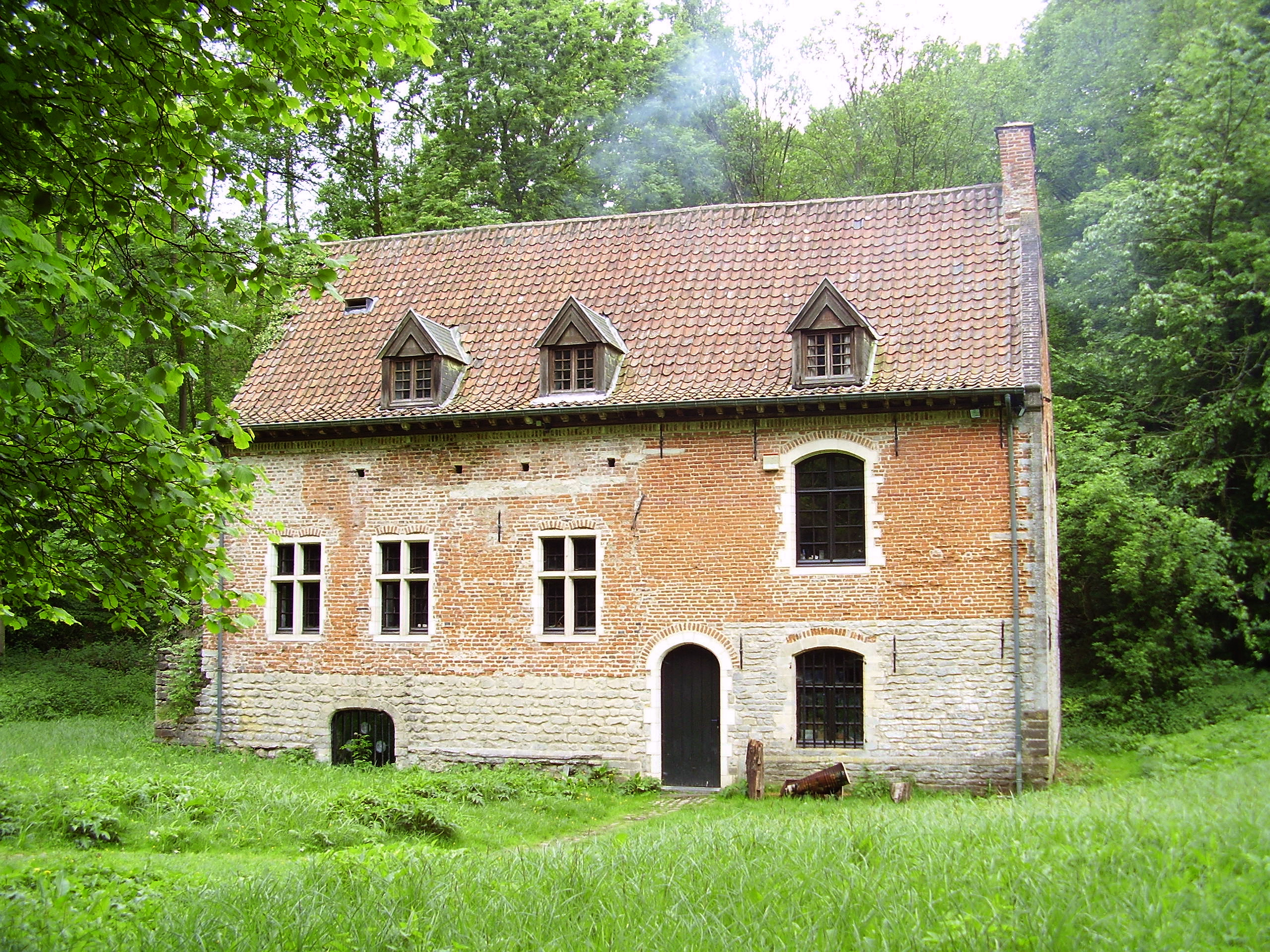 Description: Castel des Trois Fontaines, Forêt de Soignes, Auderghem (Bruxelles) Author: User:Ben2 Date of creation: 29 août 2006 Source: Photo personnelle